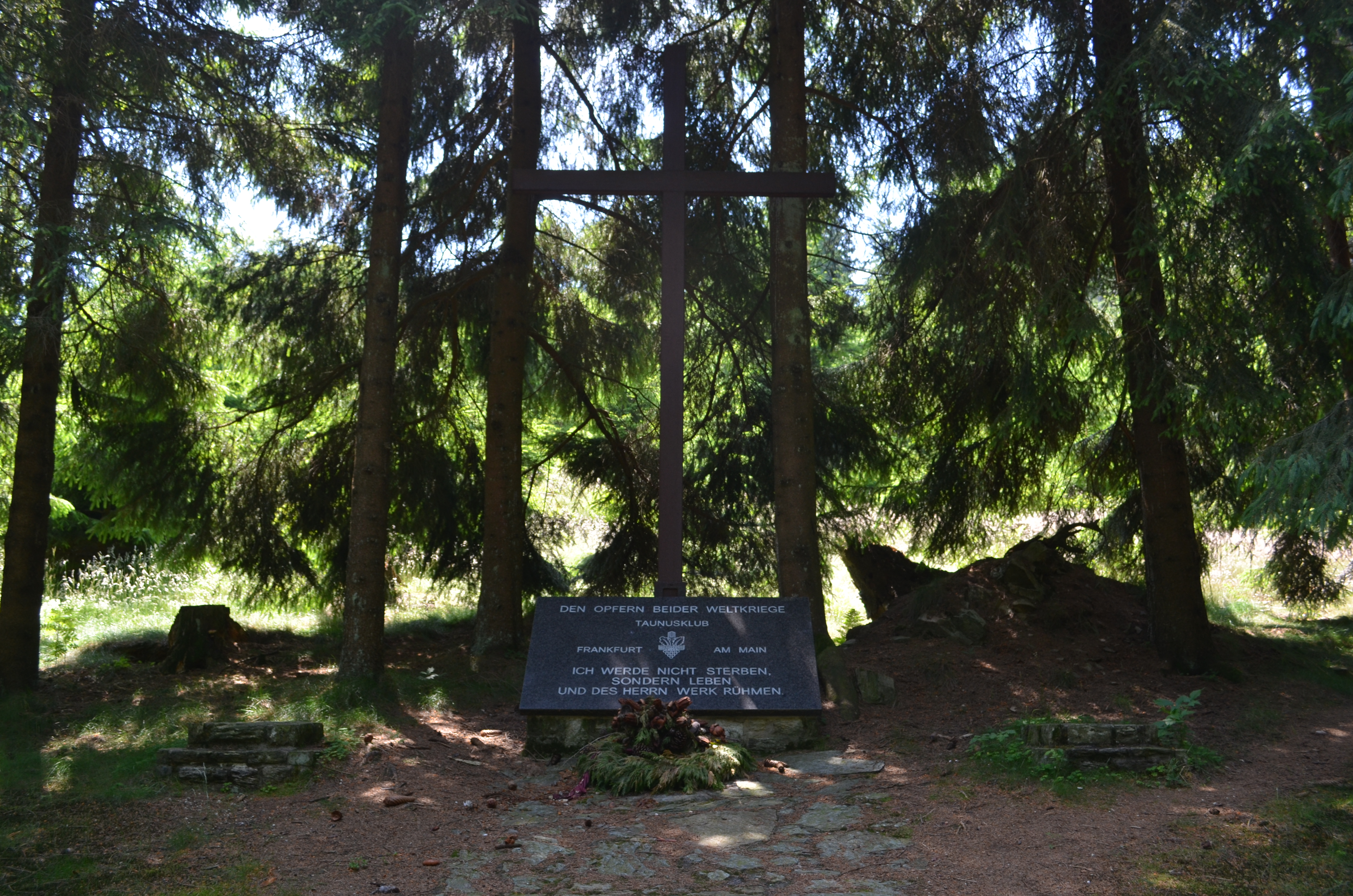 Oberreifenberg, Stockborn